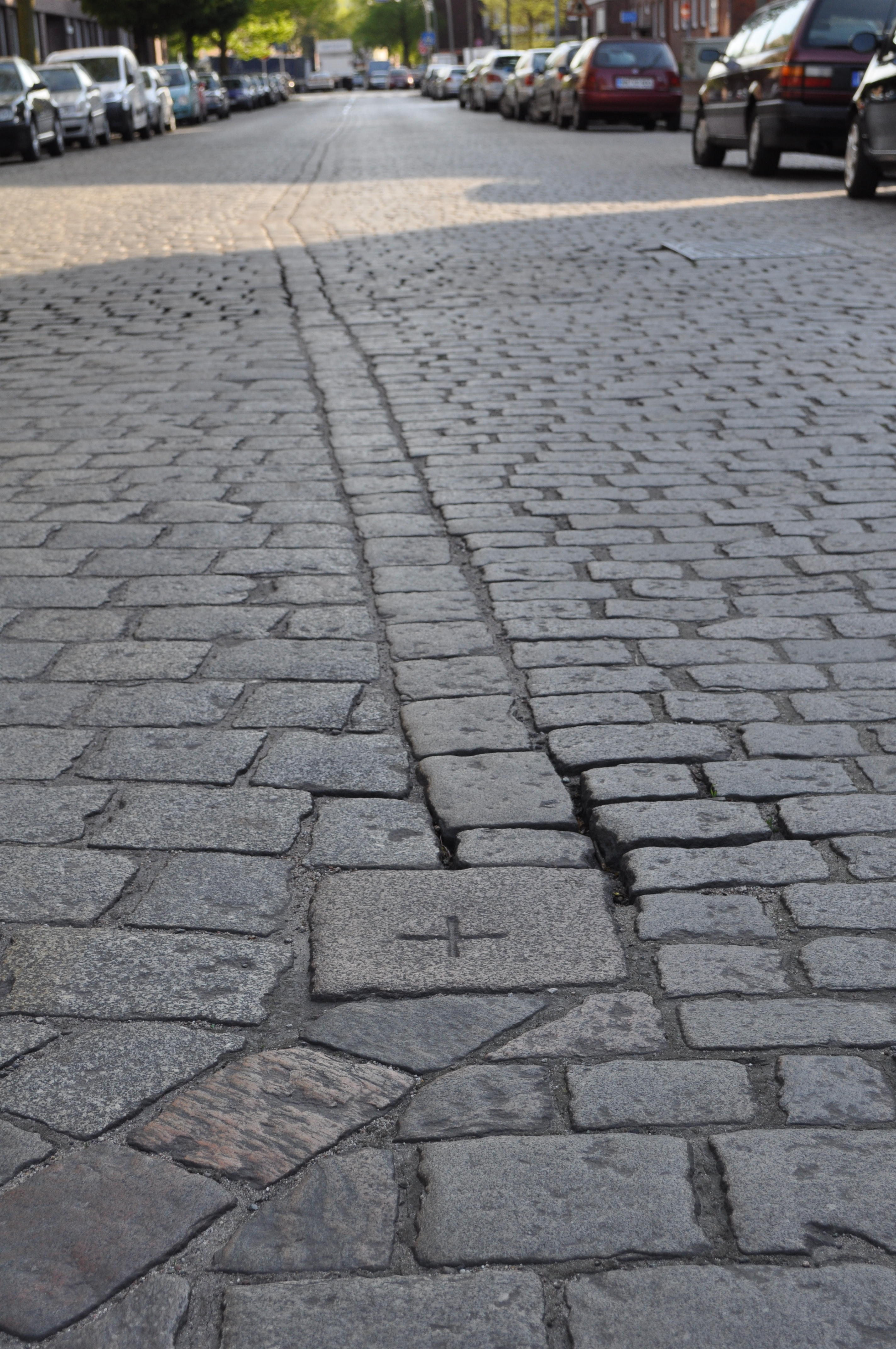 Von Pflastersteinen markierte historische Grenzlinie zwischen Wandsbek (links) und Hamburg (rechts) in der Straße Eulenkamp auf Höhe Kolpingweg - Blick stadteinwärts. Sie bildet heute die Grenze zwischen den Hamburger Stadtteilen Wandsbek und Dulsberg bzw. den Hamburger Bezirken Wandsbek und Hamburg-Nord. Im Vordergrund ist einer von noch vier vorhandenen Grenzsteinen zu erkennen.